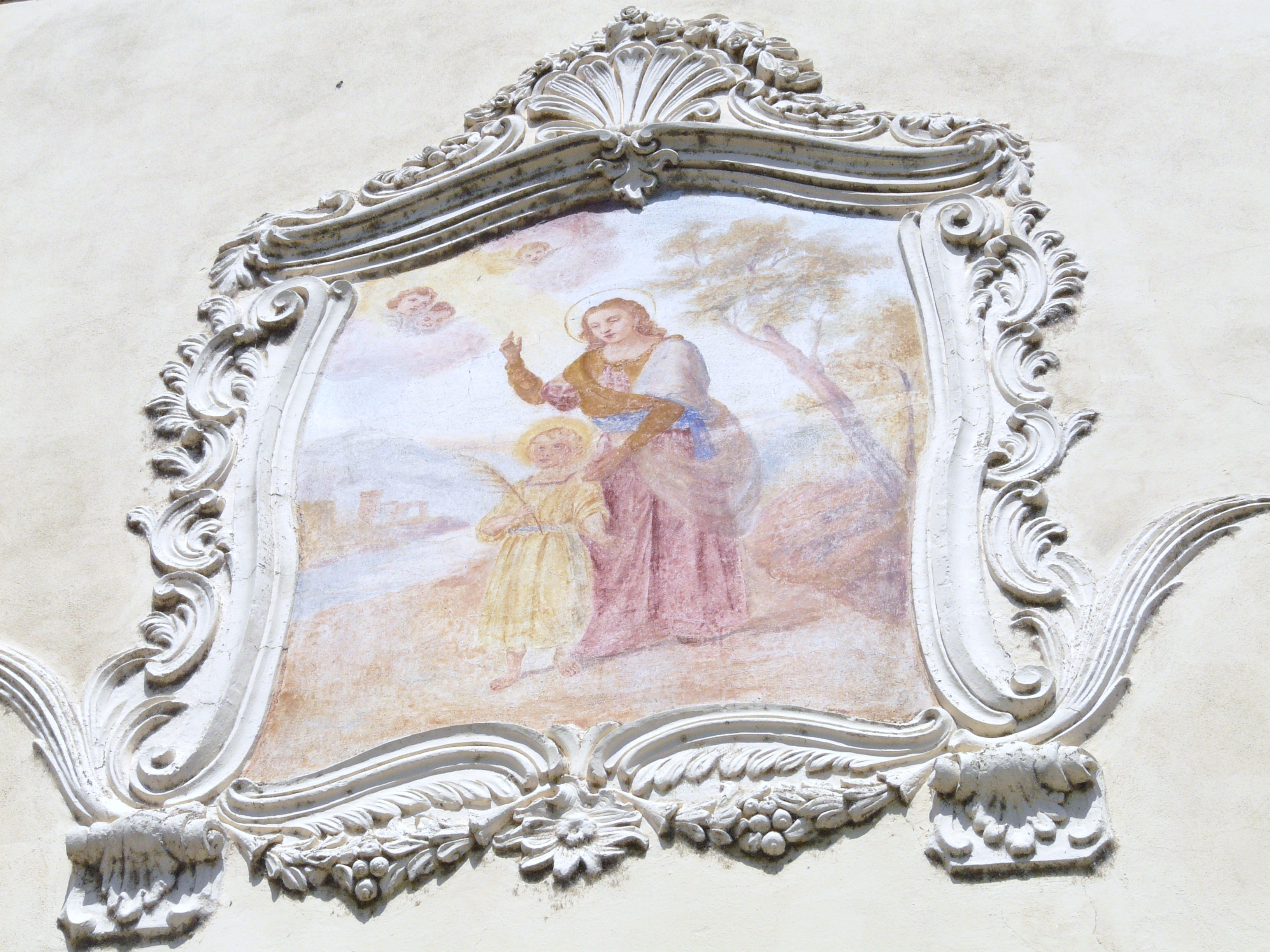 Particolare dell'affresco della chiesa dei Santi Quirico e Giulitta, Rivarola, Carasco, Liguria, Italia